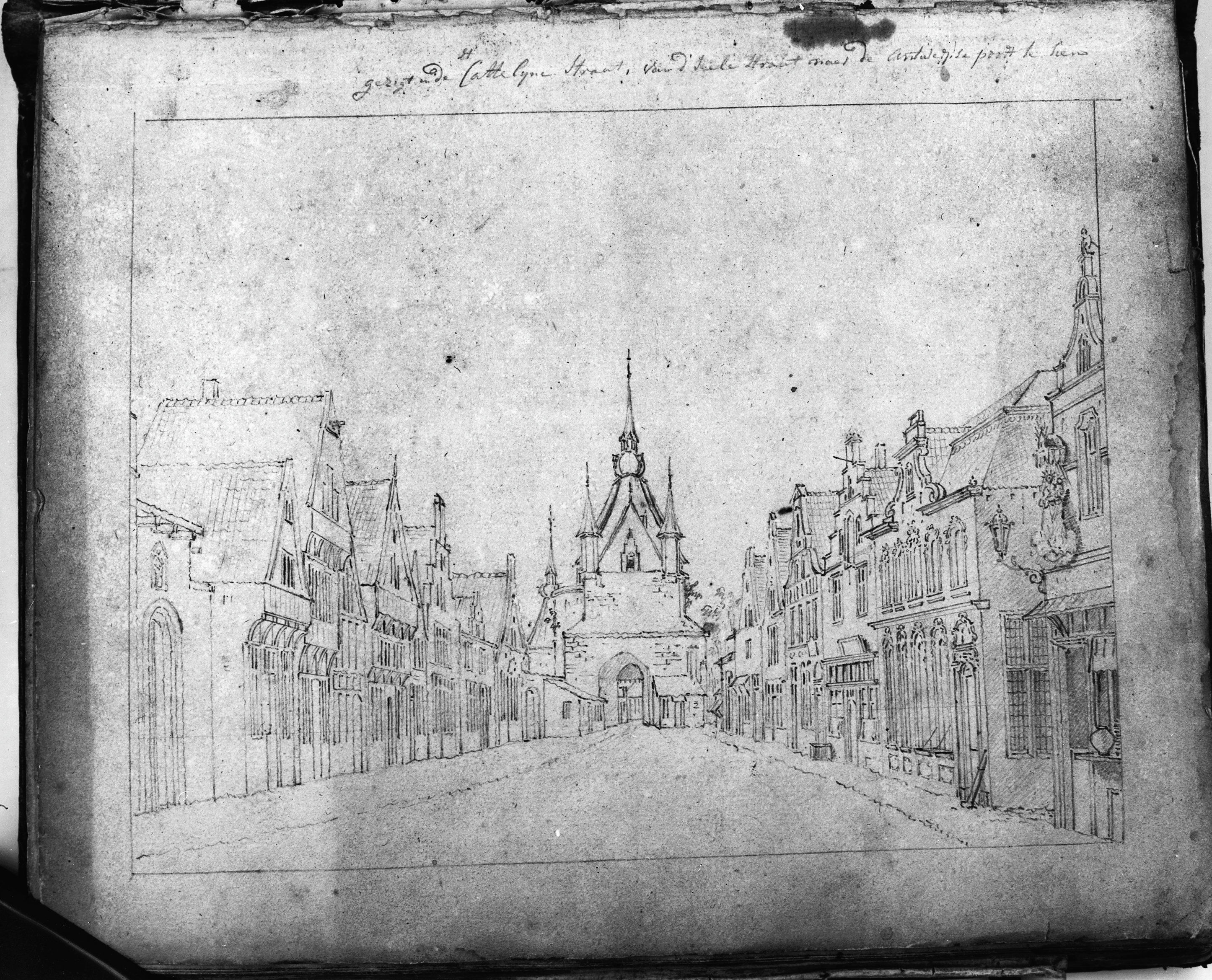 Diversen: Sint Kathelijnsestraat vanaf de Zeelstraat ziende naar de Antwerpse poort, reproduktie uit schetsboek D.Verrijk